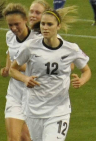 Coupe du monde féminine FIFA U-20